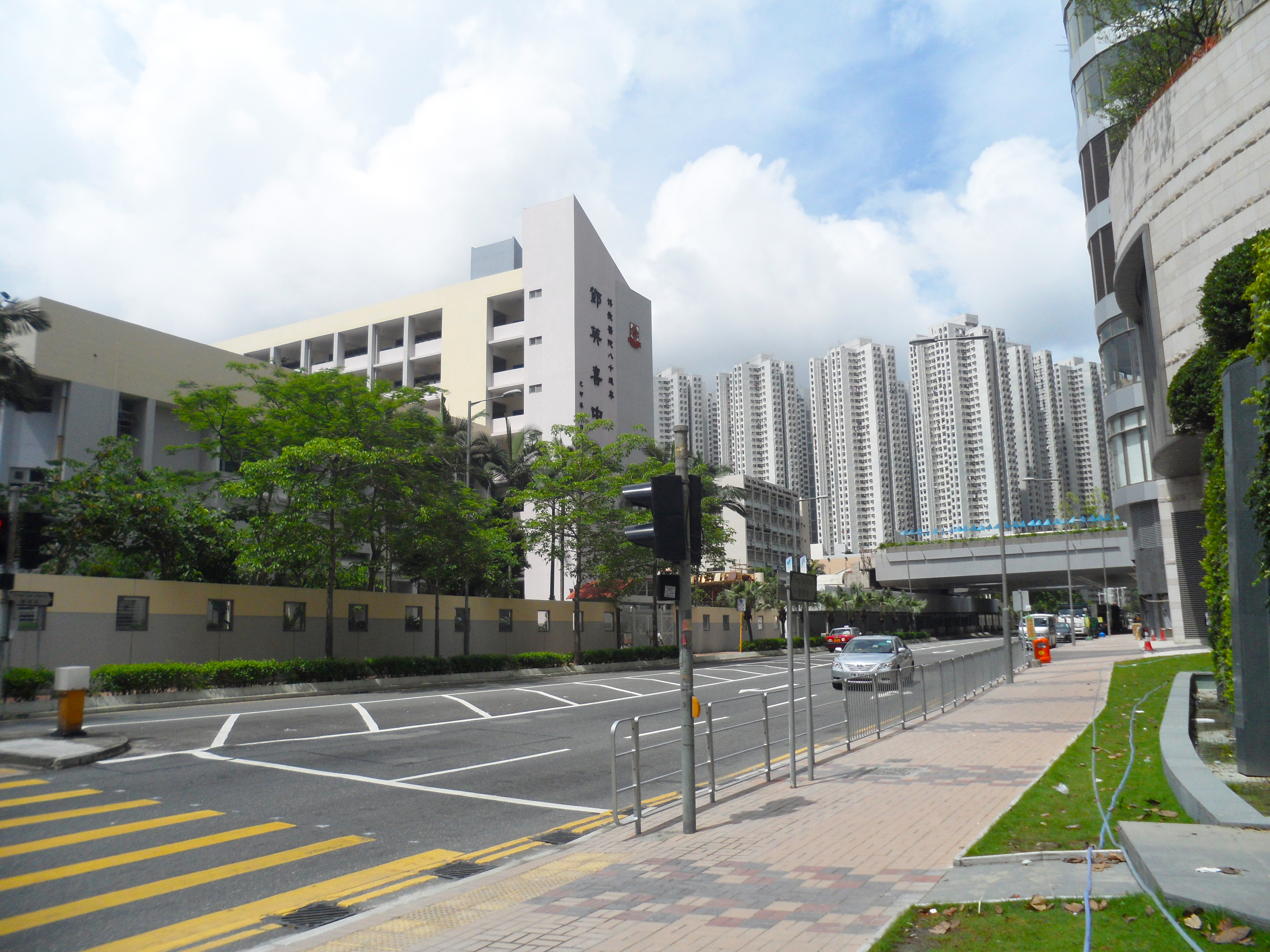 唐德街與鄧英喜中學外觀